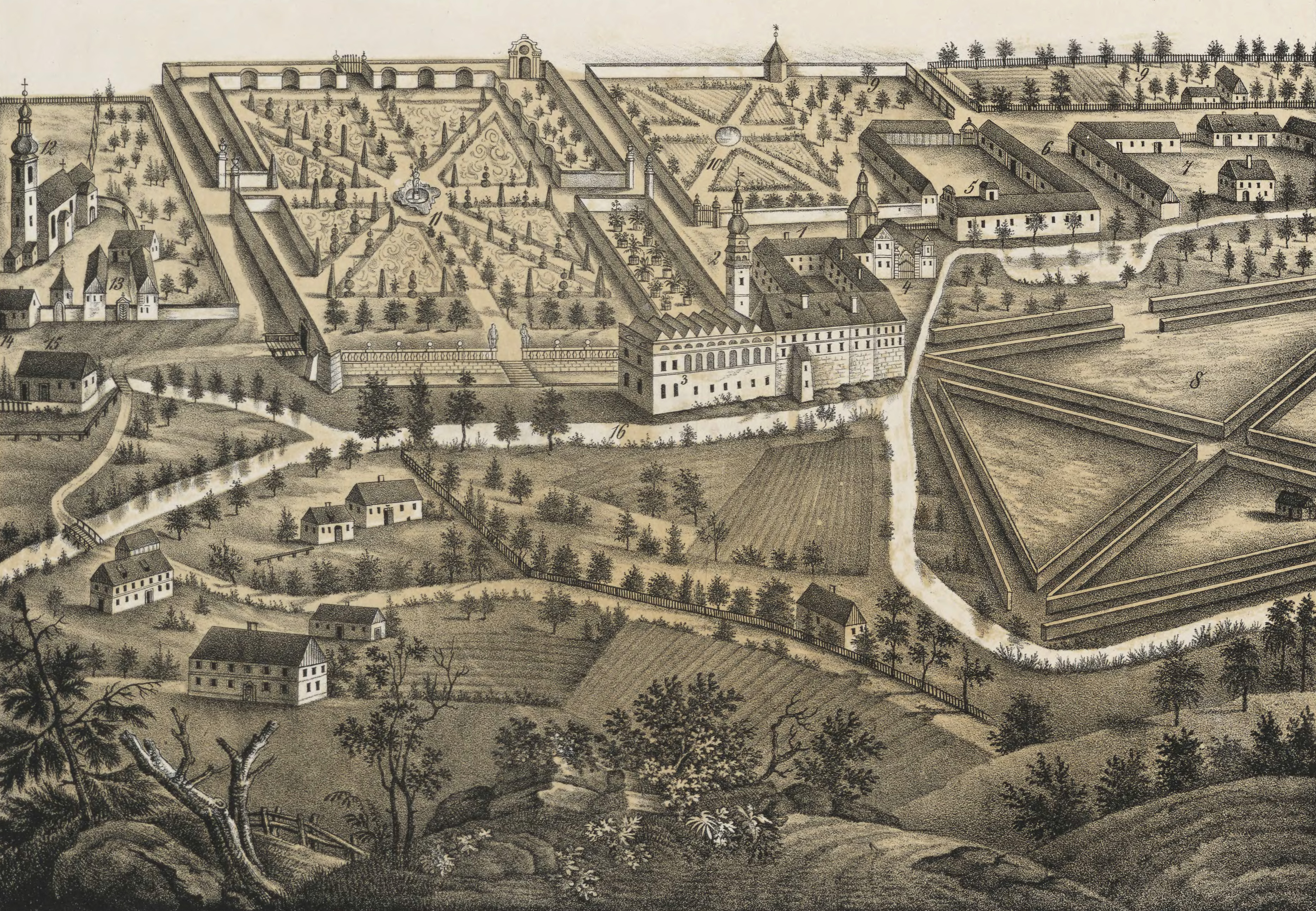 Schloss Kunzendorf in Polen auf einer alten Lithografie